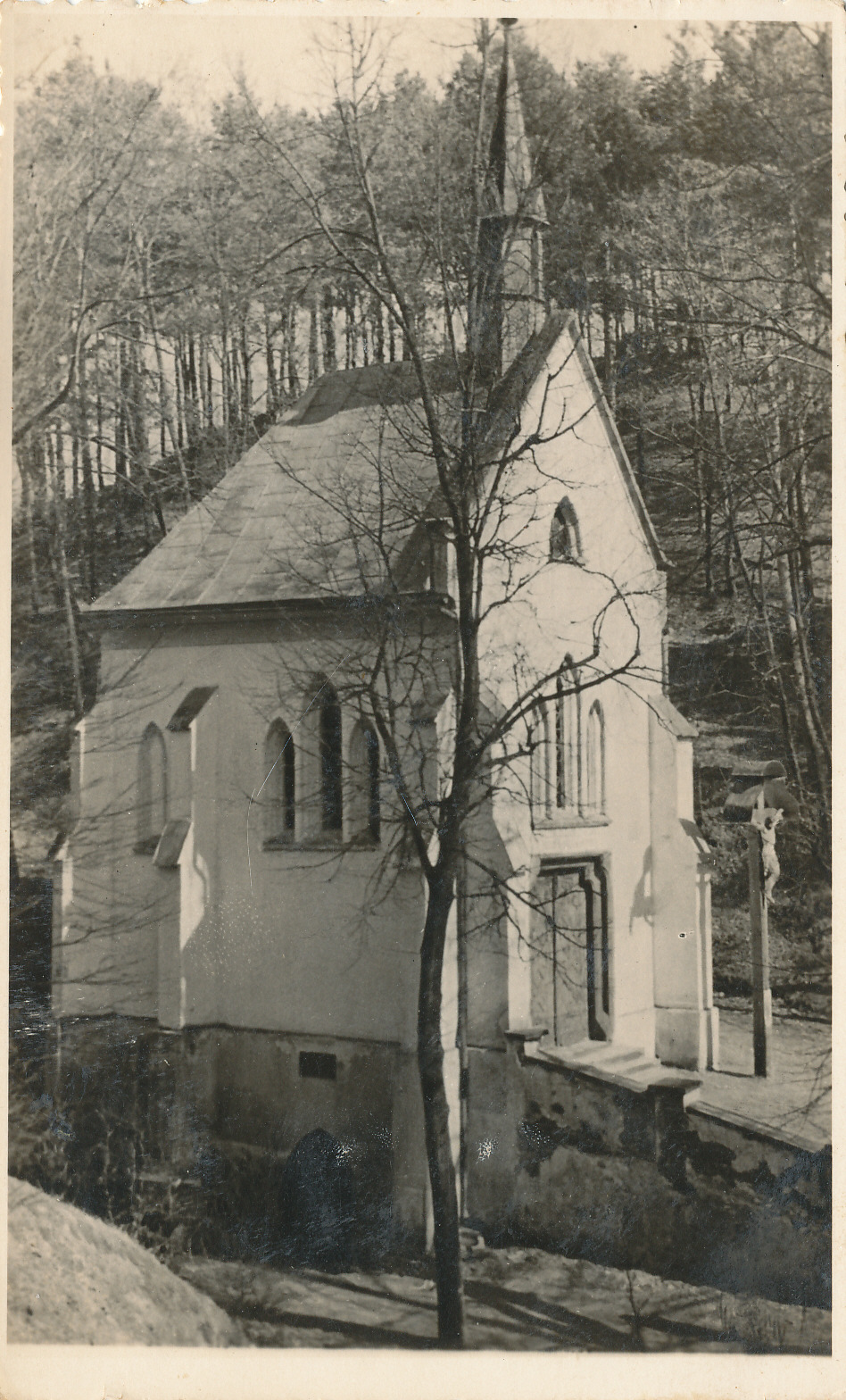 Hamiltony, kaplička (Strachotinka), rok 1946. Foto Krupička, Vyškov.